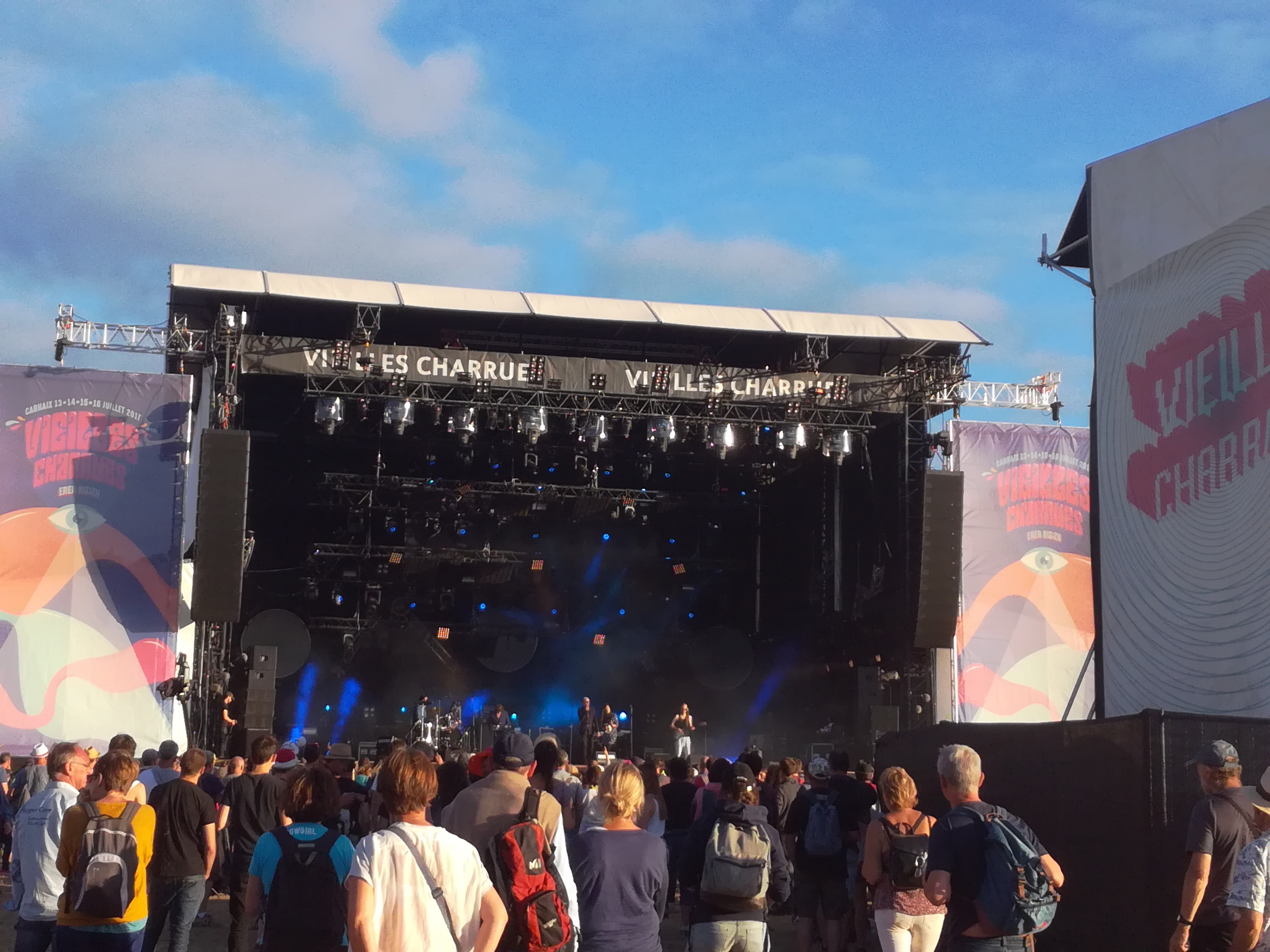 Poni Hoax sur la scène Grall du festival des Vieilles Charrues 2017.